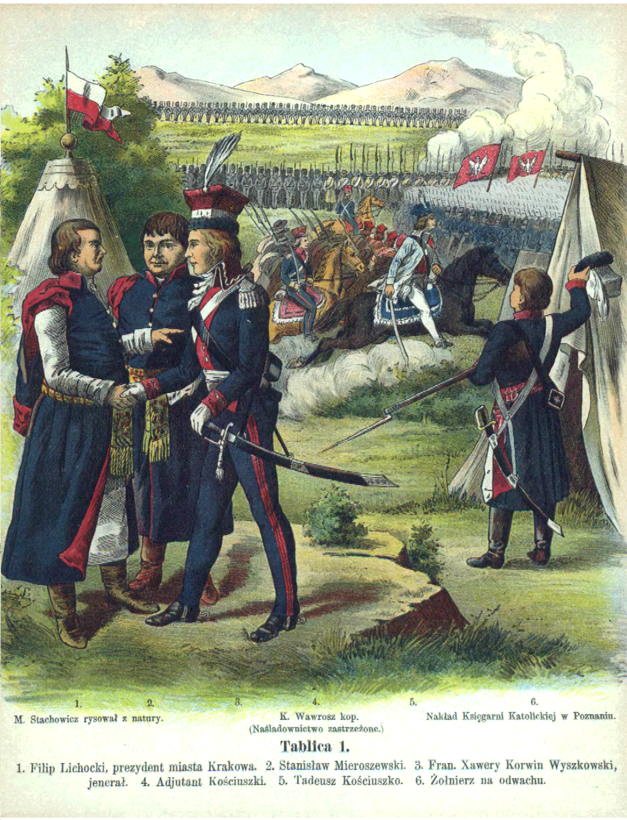 Polish army near Kraków 1794